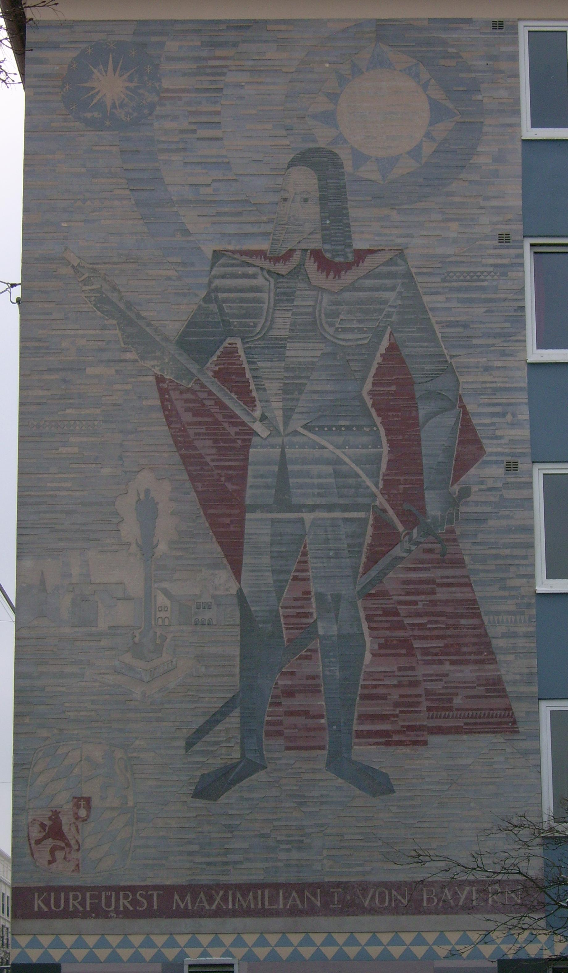 Sgraffito in München, Maxvorstadt von Erich Horndasch